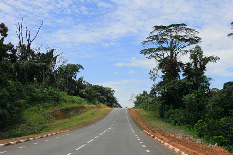 Carretera y Selva